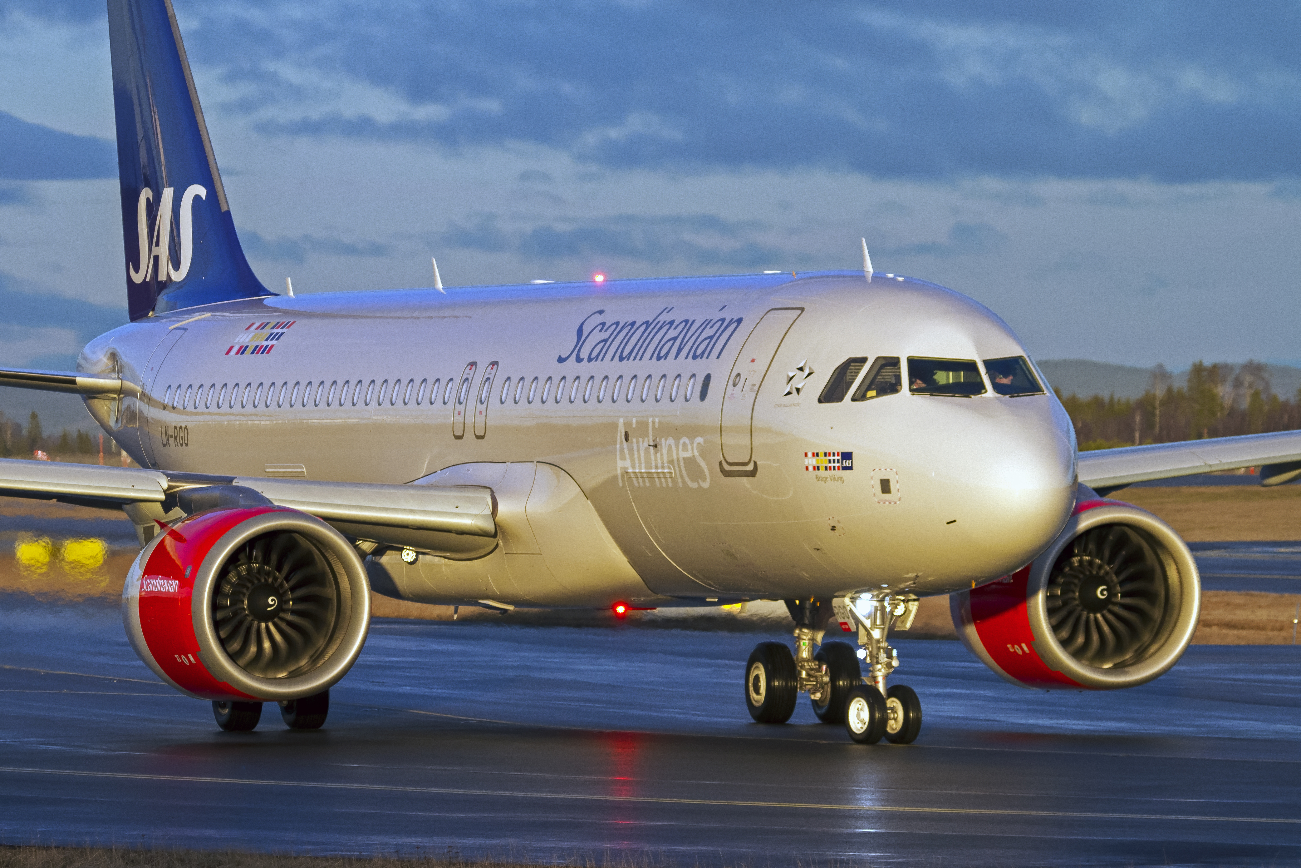 LN-RGO A320neo